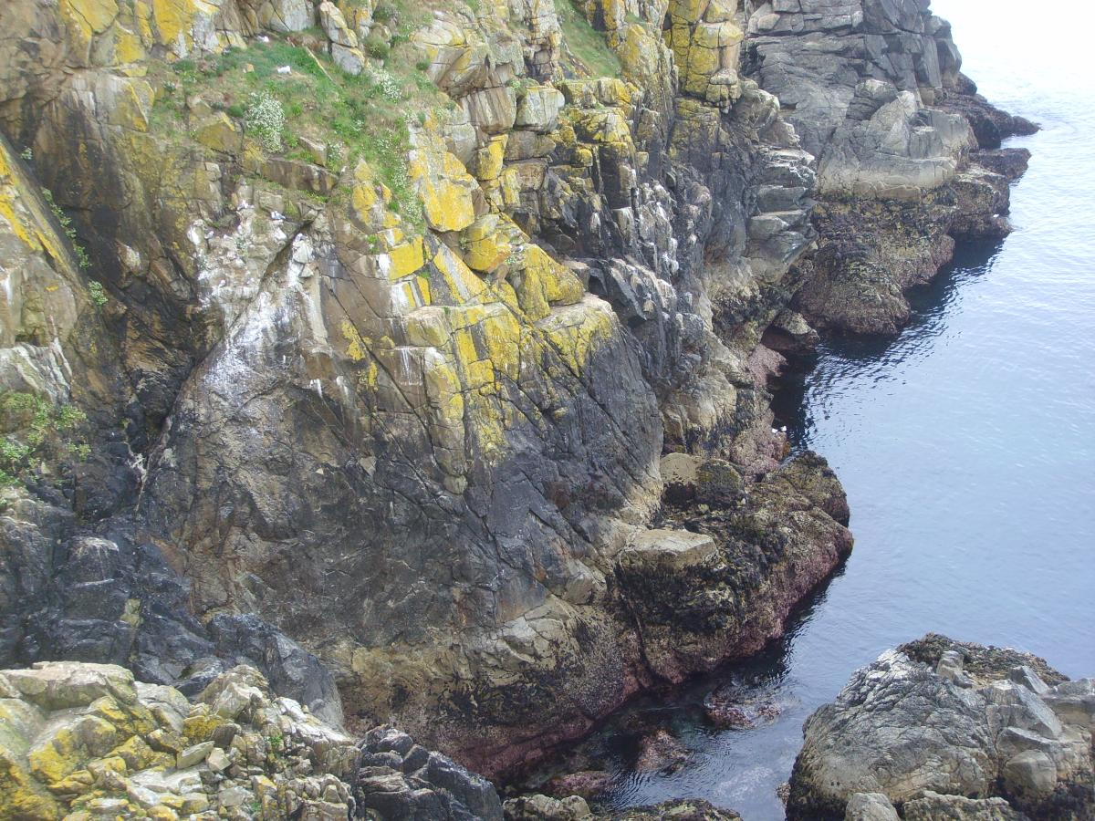 Ceintures d'algues et de lichens sur la côte nord du Cap Sizun (Beg al Lochou, Goulien, Finistère, Bretagne, France)